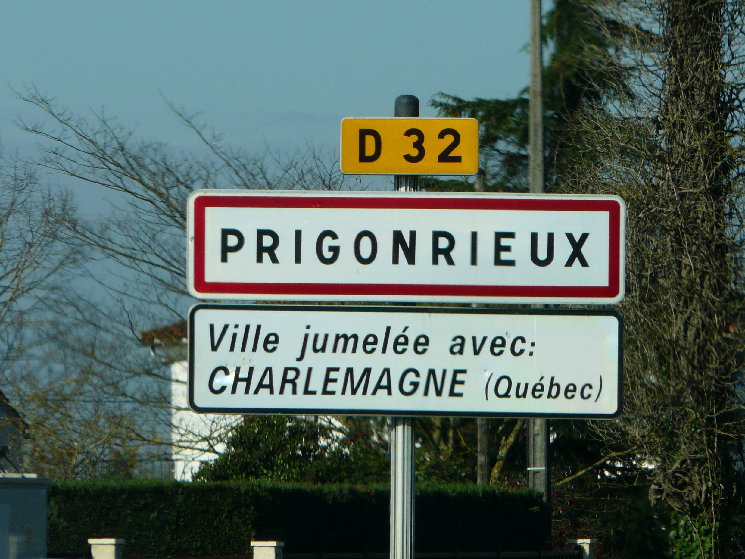 Panneau de jumelage de Prigonrieux, Dordogne, France.